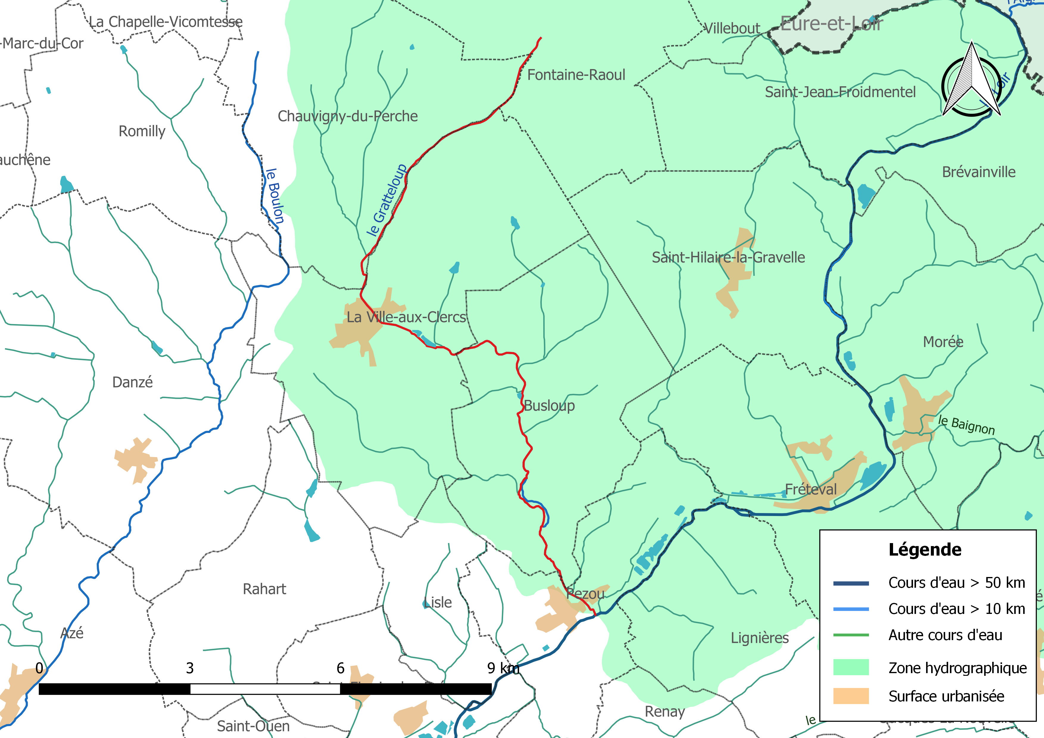 Carte du cours d'eau « le Gratteloup » et de son bassin versant (zone hydrographique dans laquelle il s'insère).